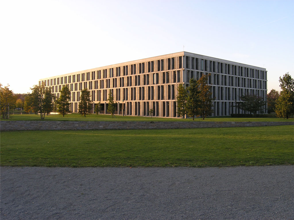 Bundesarbeitsgericht (errichtet zwischen 1996 und 1999), am Hugo-Preuß-Platz in Erfurt